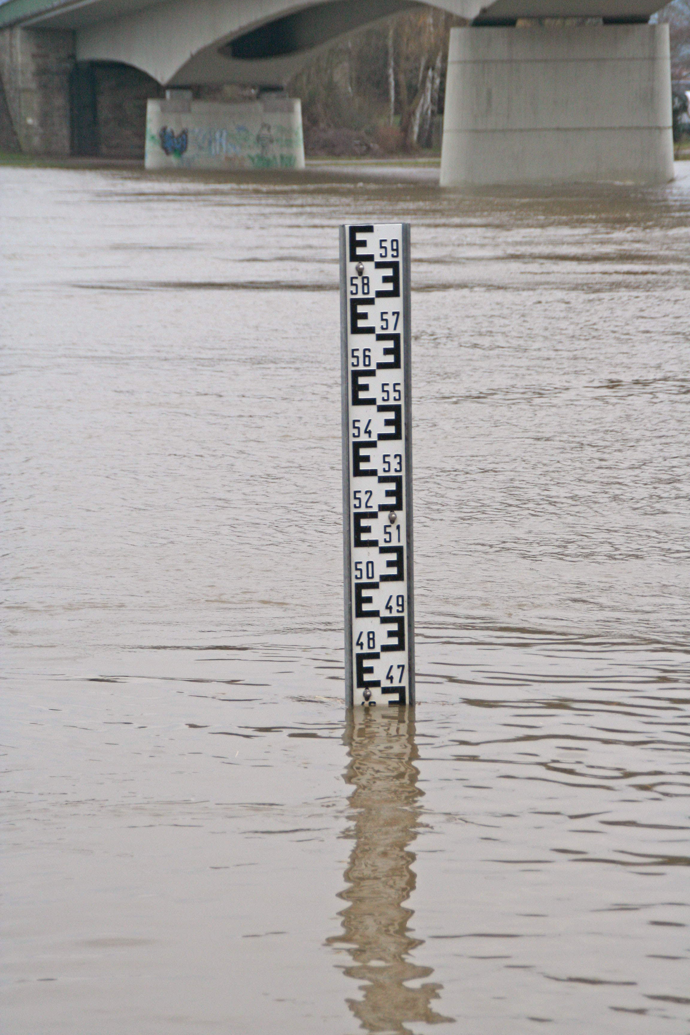 Musel Réimech den 11. Mäerz 2006.